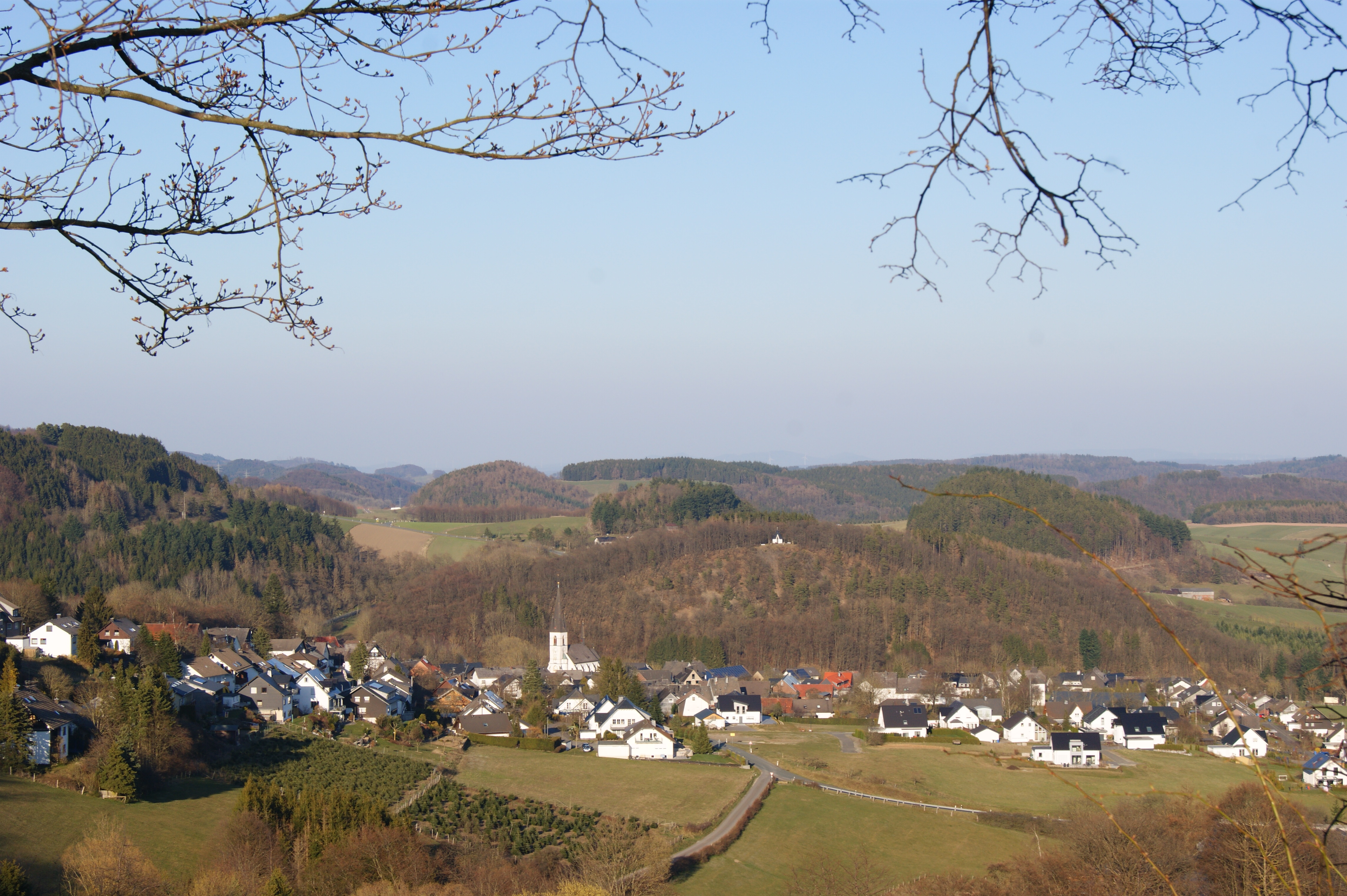 Blick von Nordosten auf Düdinghausen, Natur und Häuser